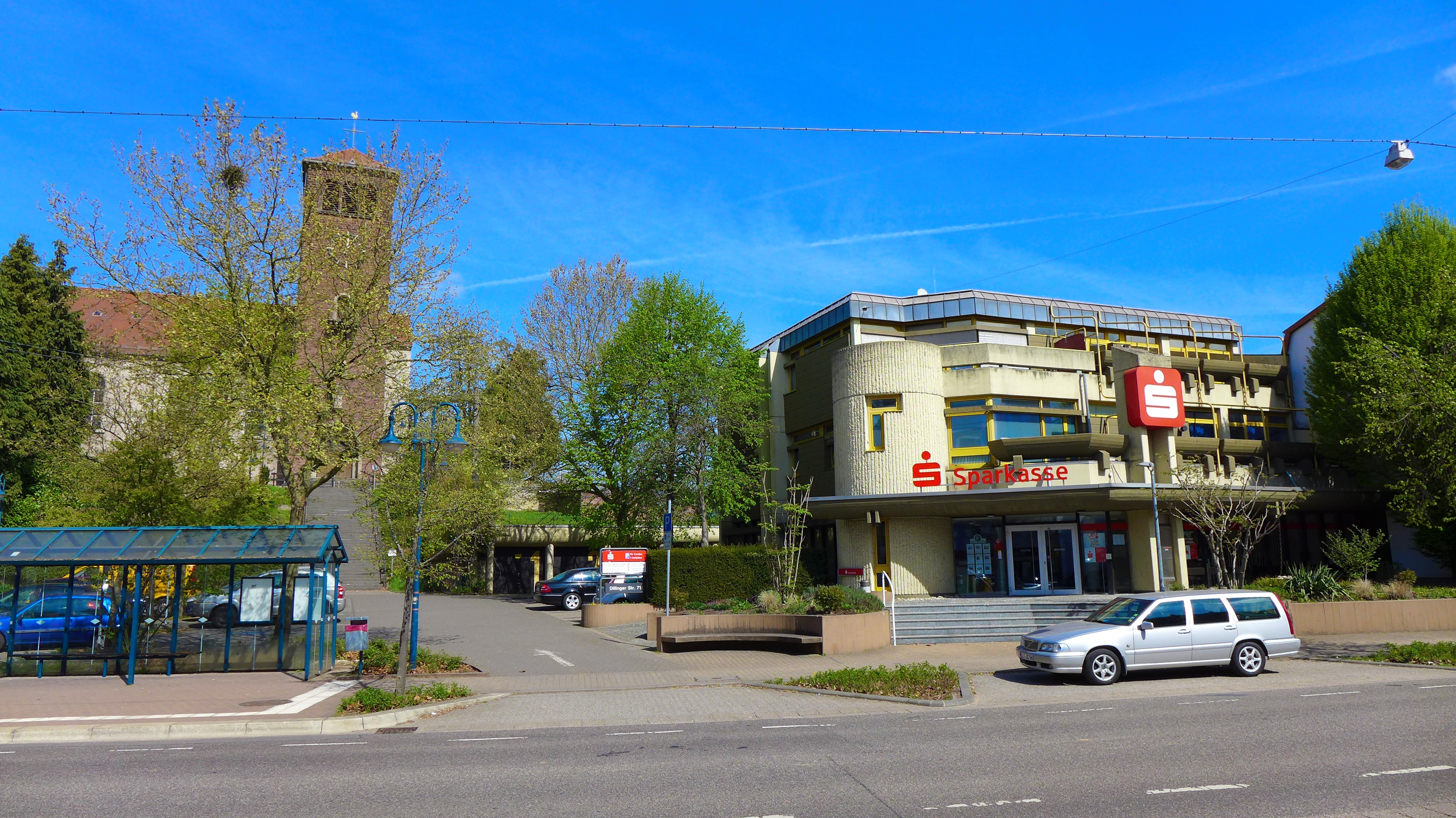 Diefflen, Kirchplatz mit der Dieffler Kirche St. Josef und St. Wendelin und der örtlichen Filiale der Kreissparkasse Saarlouis